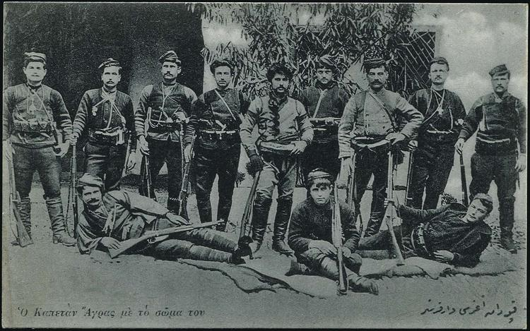 Четата на Телос Агапино, капитан Аграс.